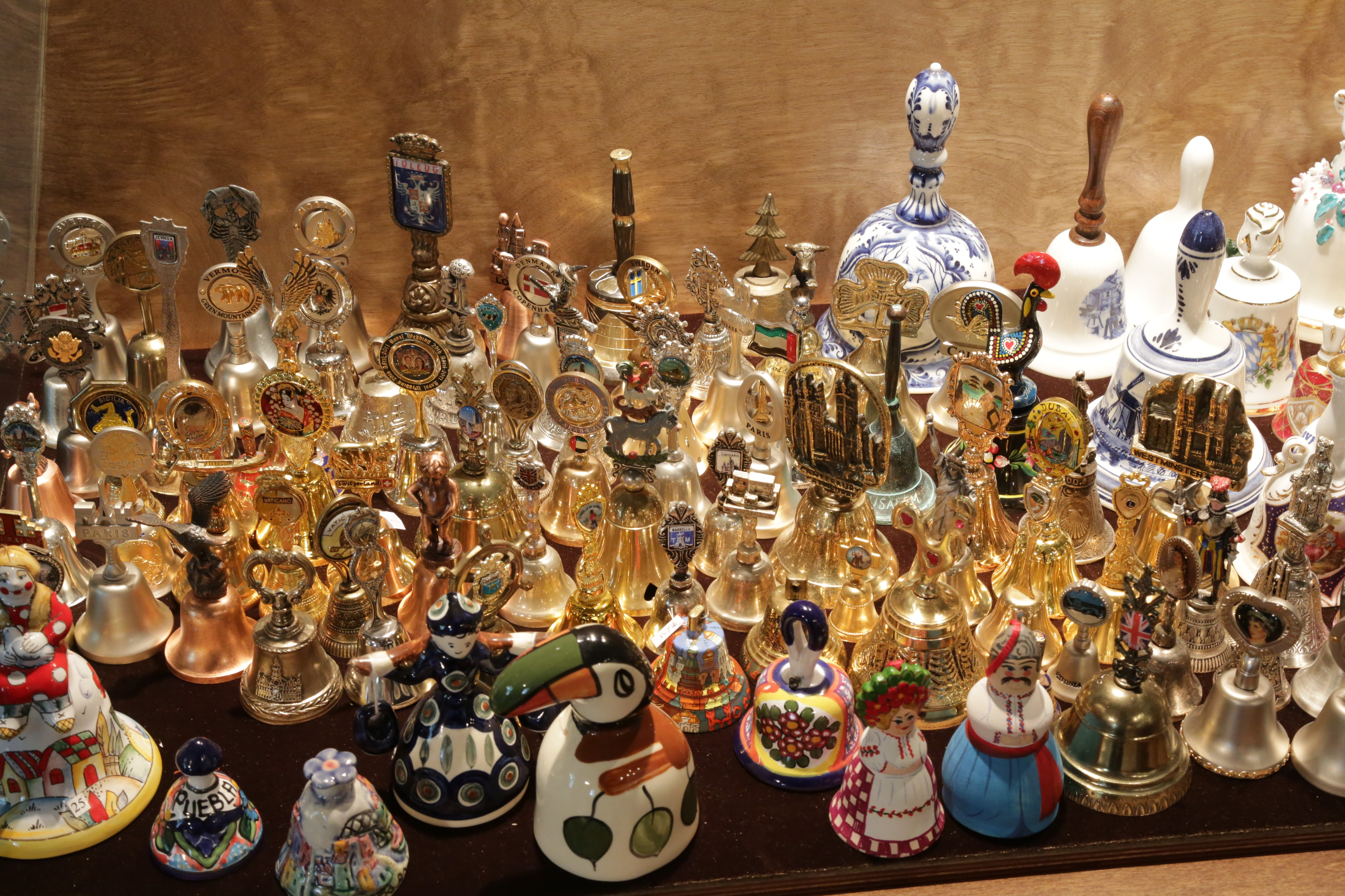 Zvanu muzejs